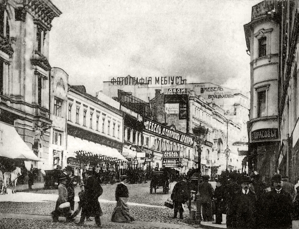 Тверской подворье на Кузнецком Мосту